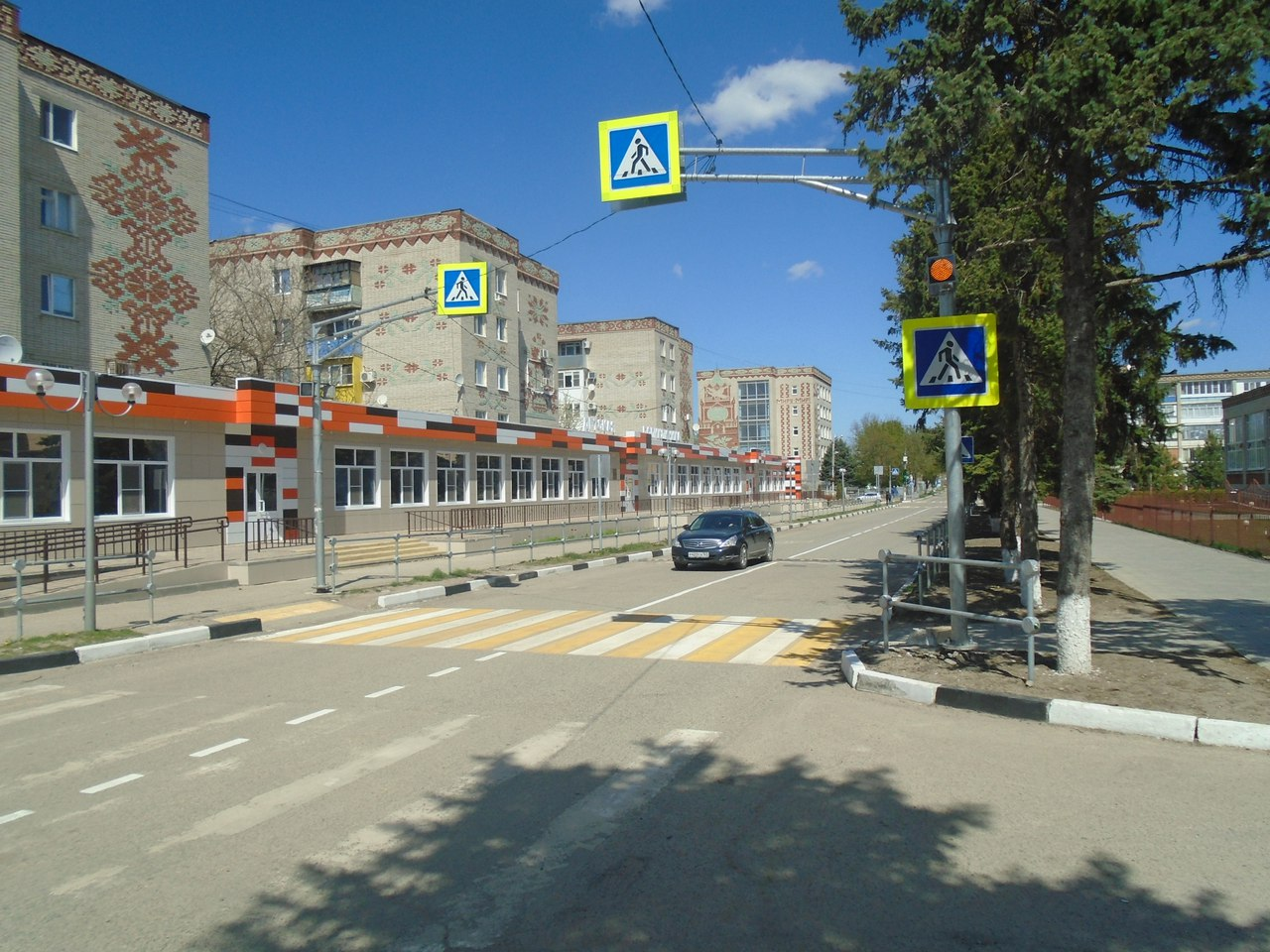 Современный облик станицы Ленинградской (центр, ул. Красная)